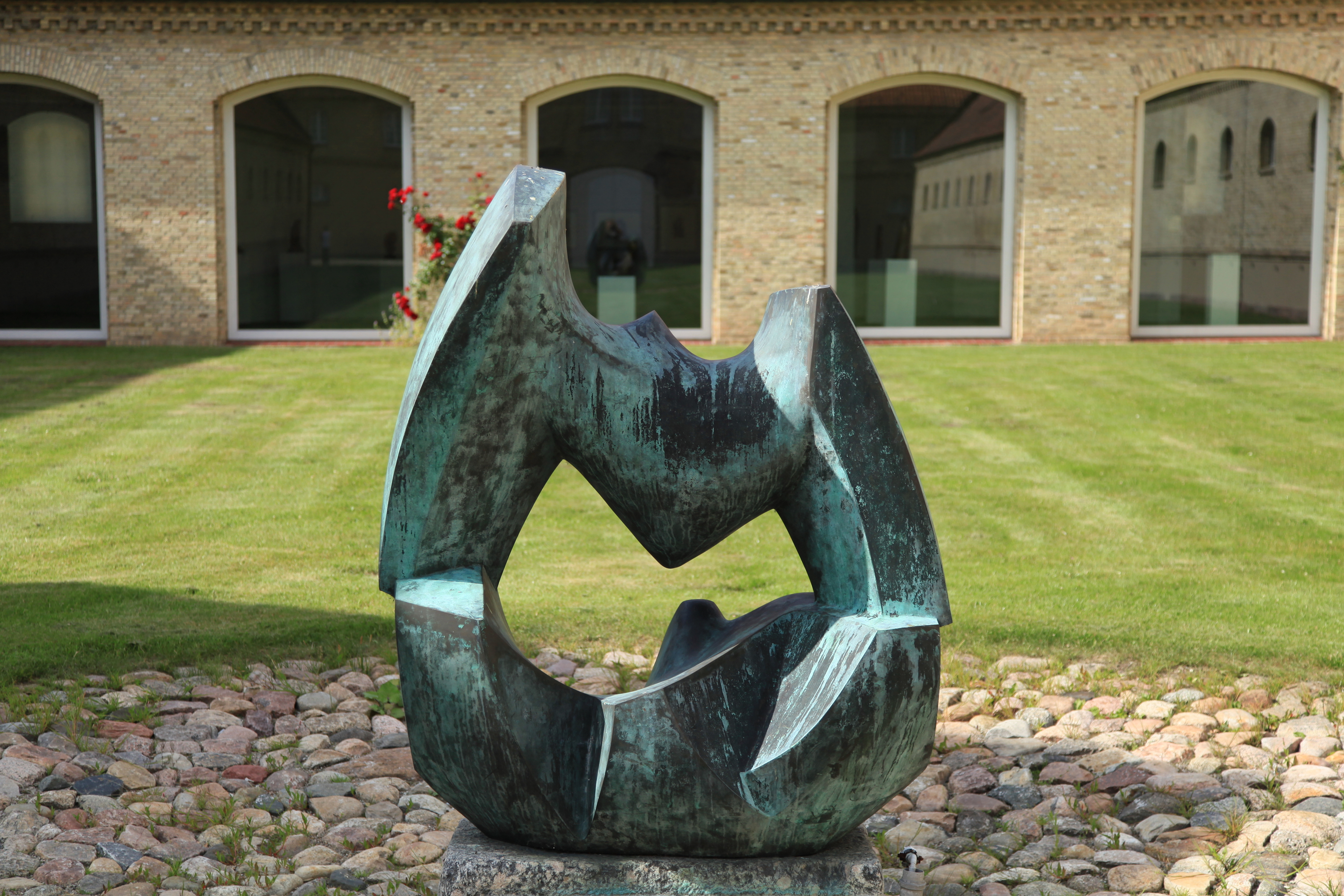 Kämpfende Vögel von Pierre Schumann, 1968, im Skulpturenpark Schloss Gottorf auf der Schlossinsel in Schleswig